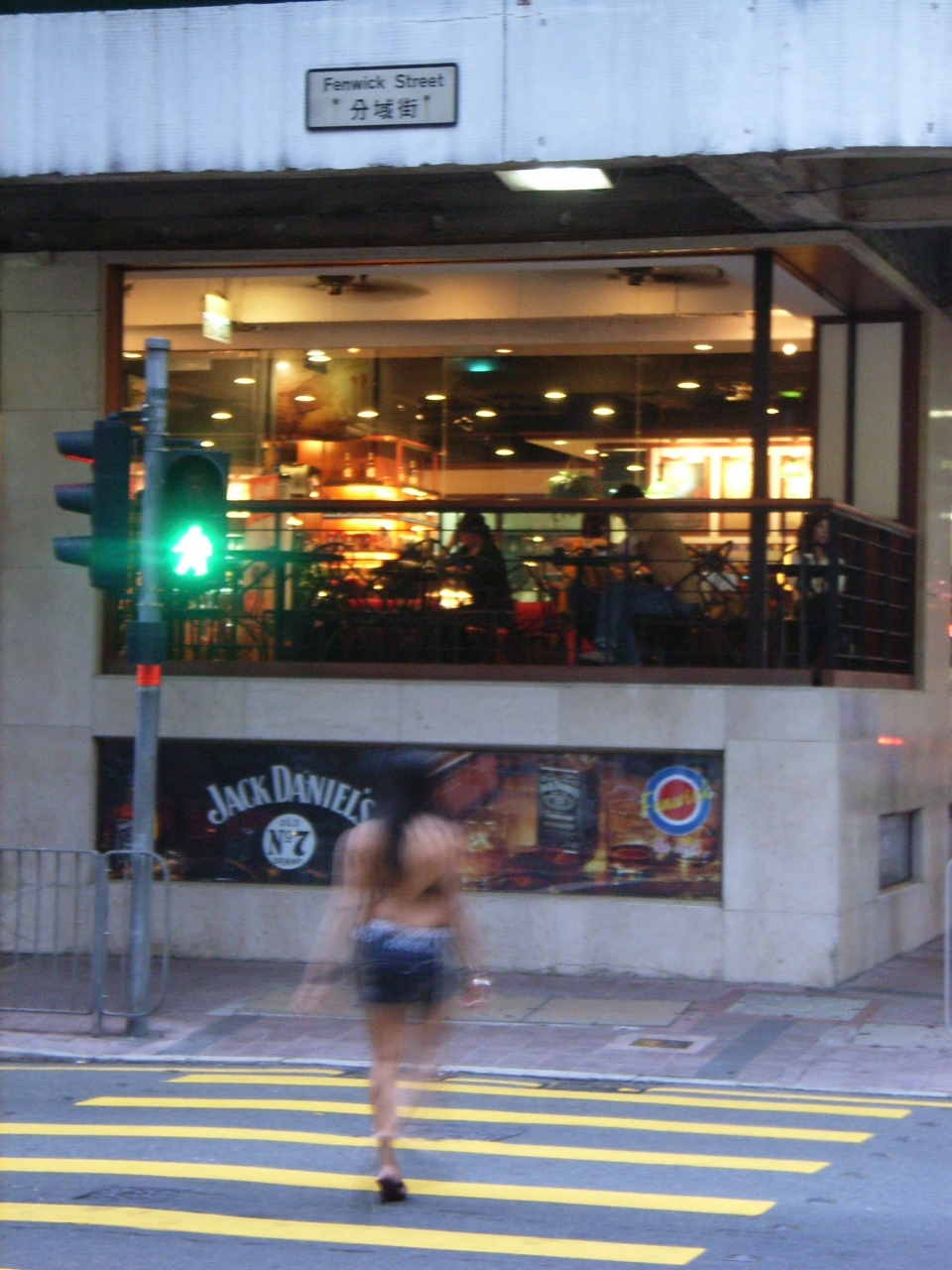 灣仔分域街的黃昏倩影, Fenwick Street, Wan Chai, Hong Kong By KennethTom